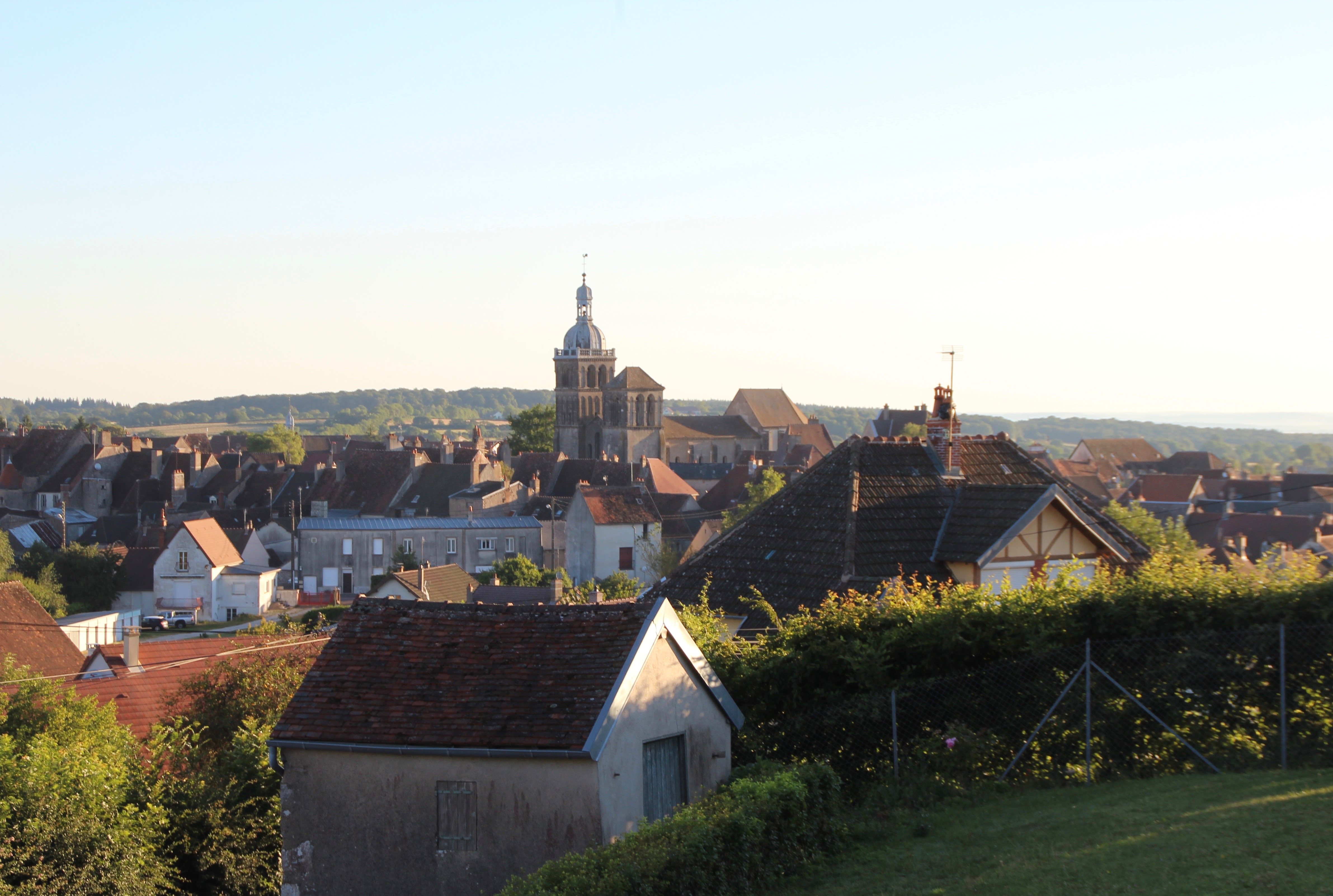 Saulieu